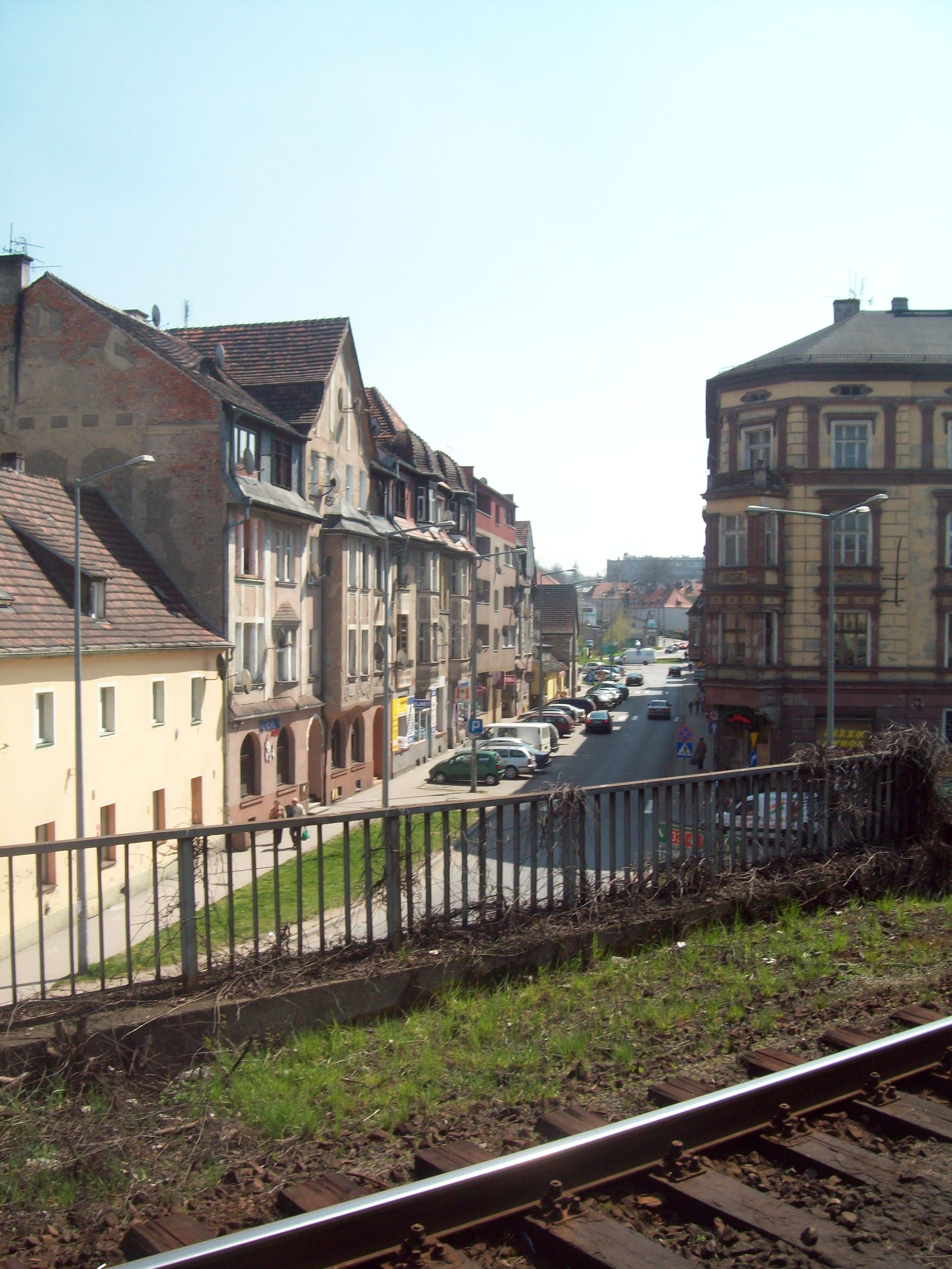 Ulica Lutycka w Kłodzku, widok ze stacji Kłodzko Miasto